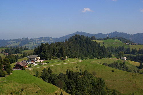 Lüderenalp (Kurhaus / Hotel)